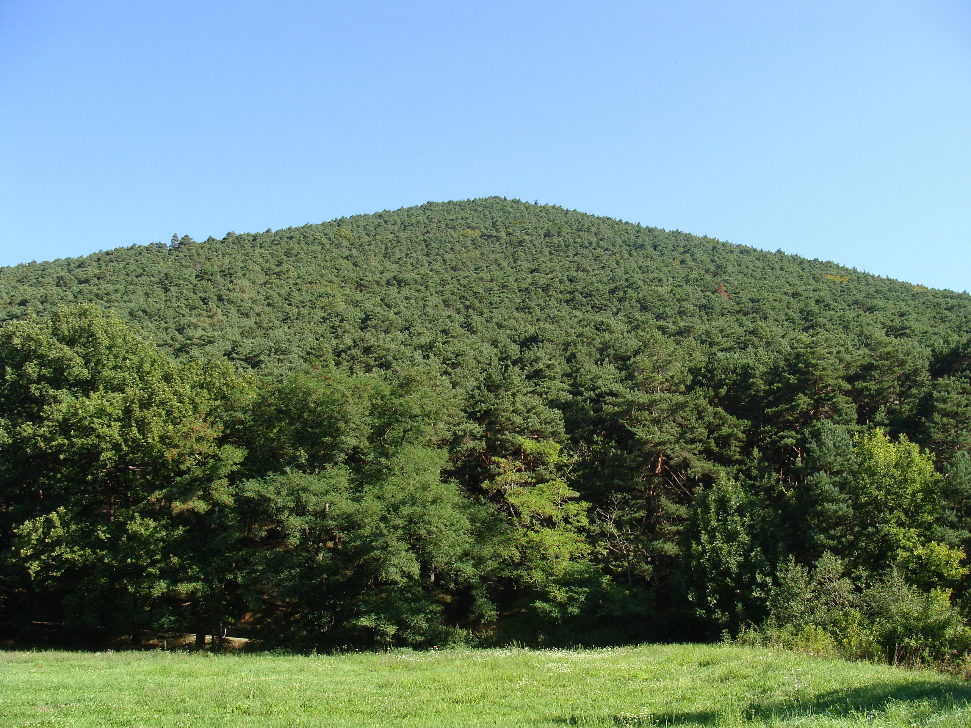 Hüttenberg am Kalmitmassiv im Pfälzerwald